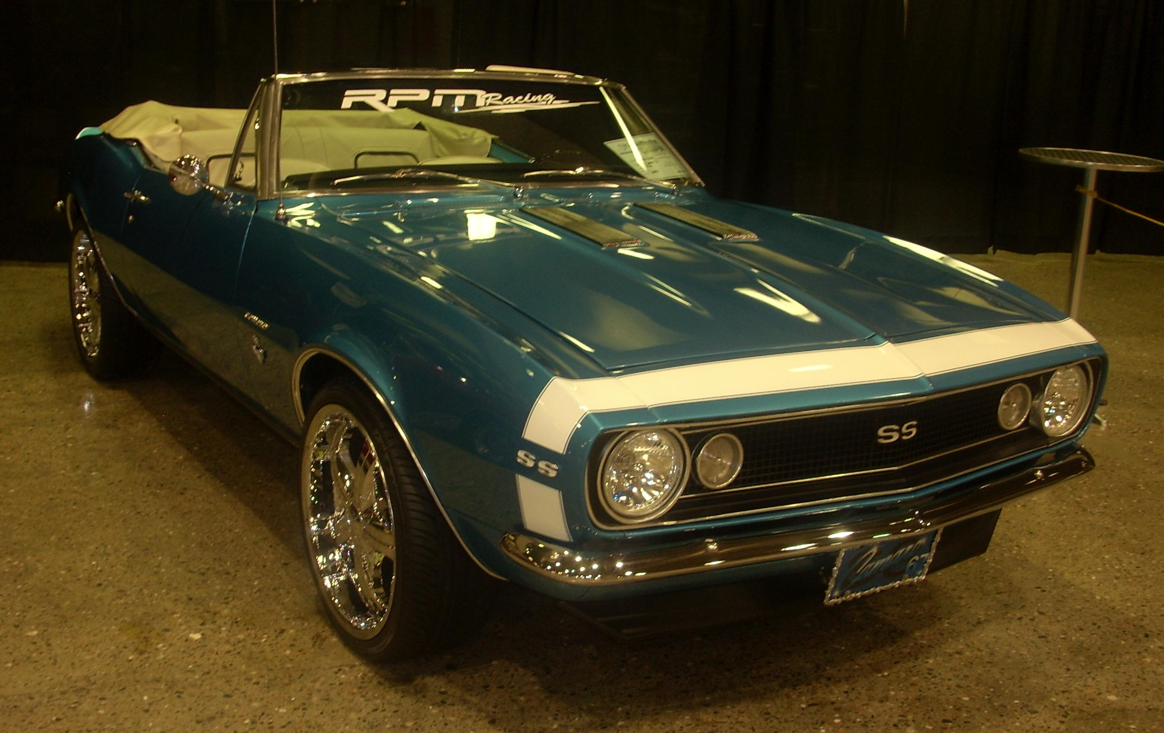 Highly modified 1967 Chevrolet Camaro SS Convertible photographed at Auto classique Montréal 2008.